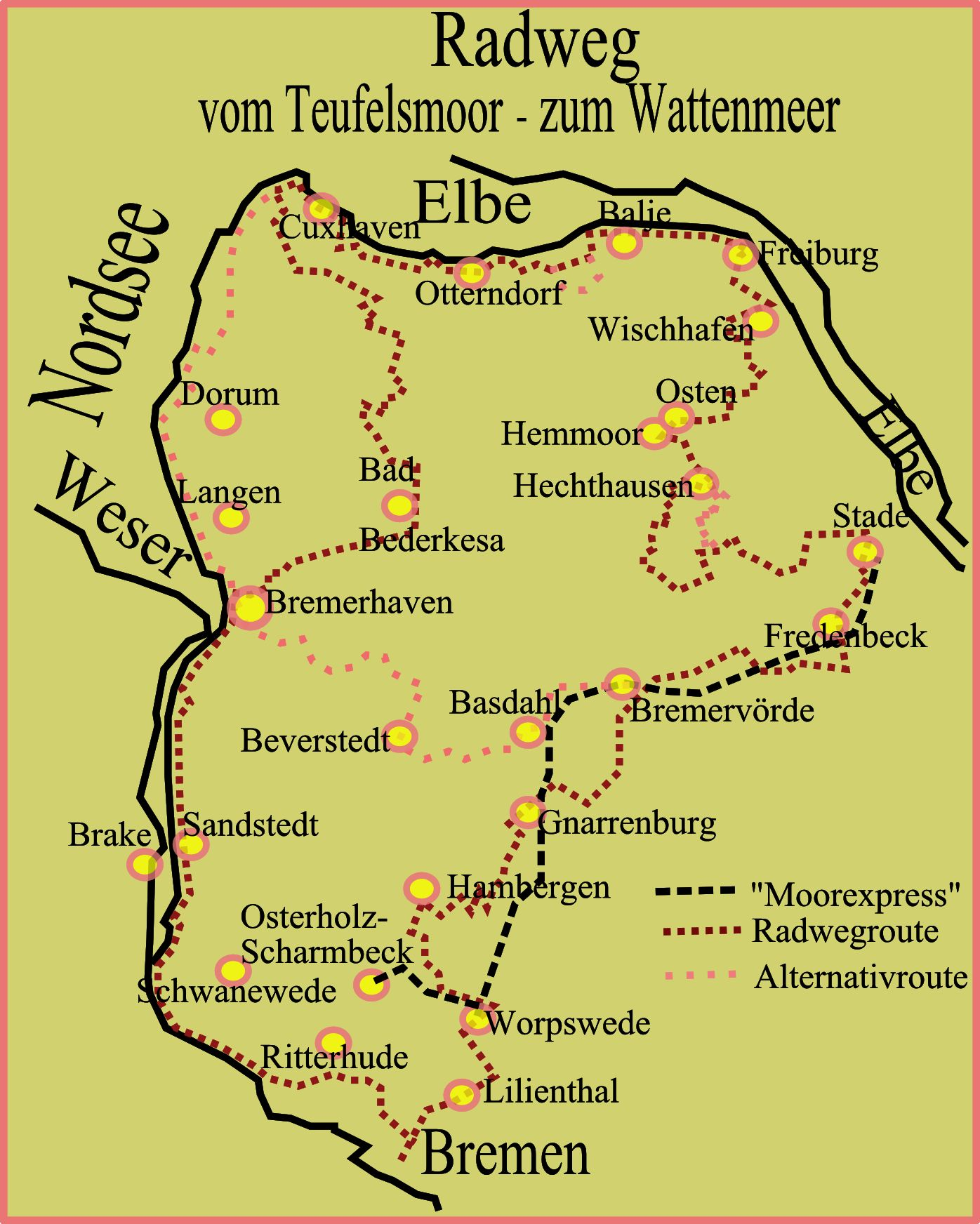 Rouen des Radweges "Vom Teufelsmoor zum Wattenmeer"